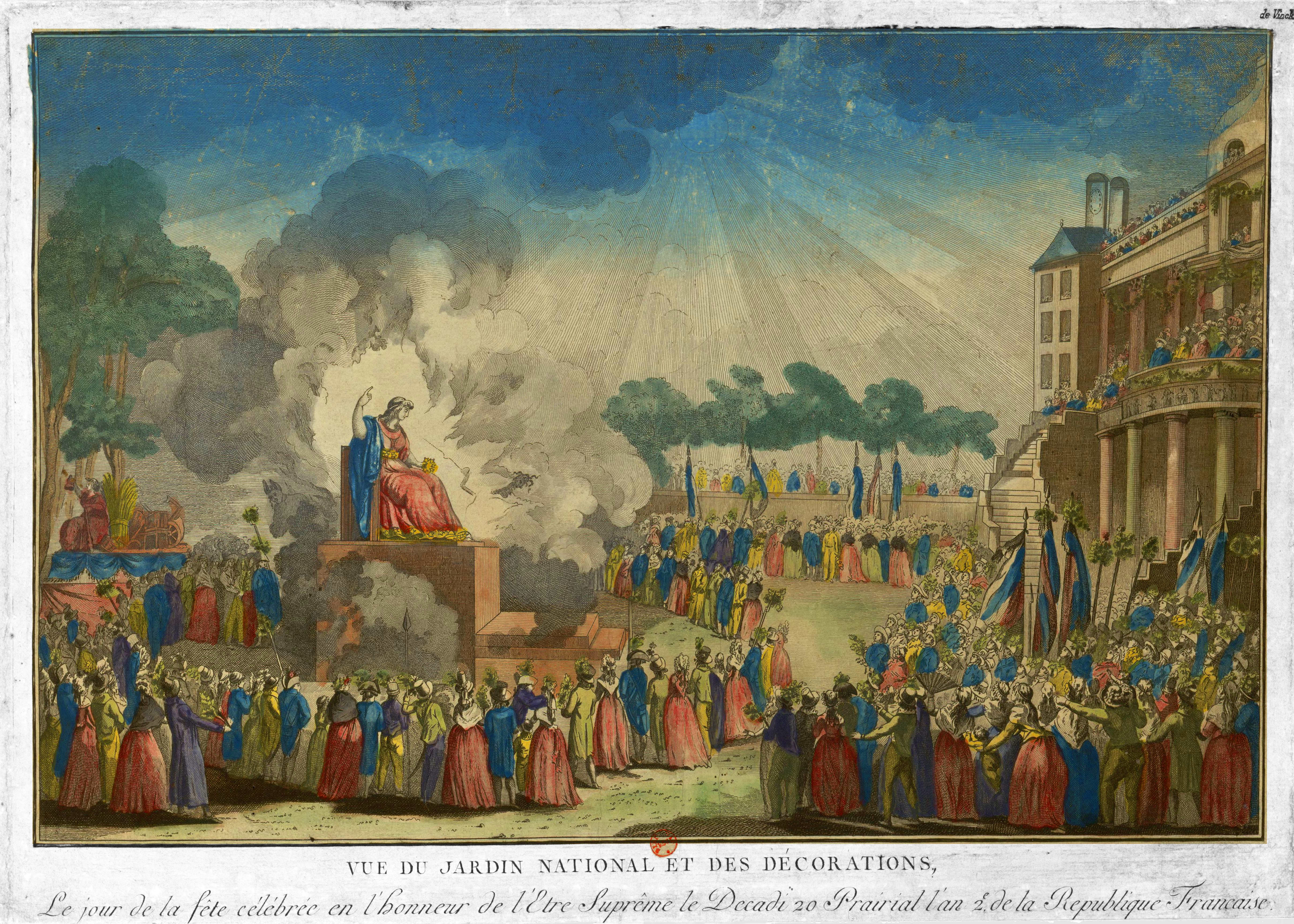 Vue du jardin national et des décorations, le jour de la fête célébrée en l’honneur de l’être suprême (Festival of the Supreme Being)